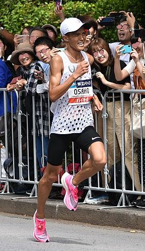 マラソン 大迫 傑